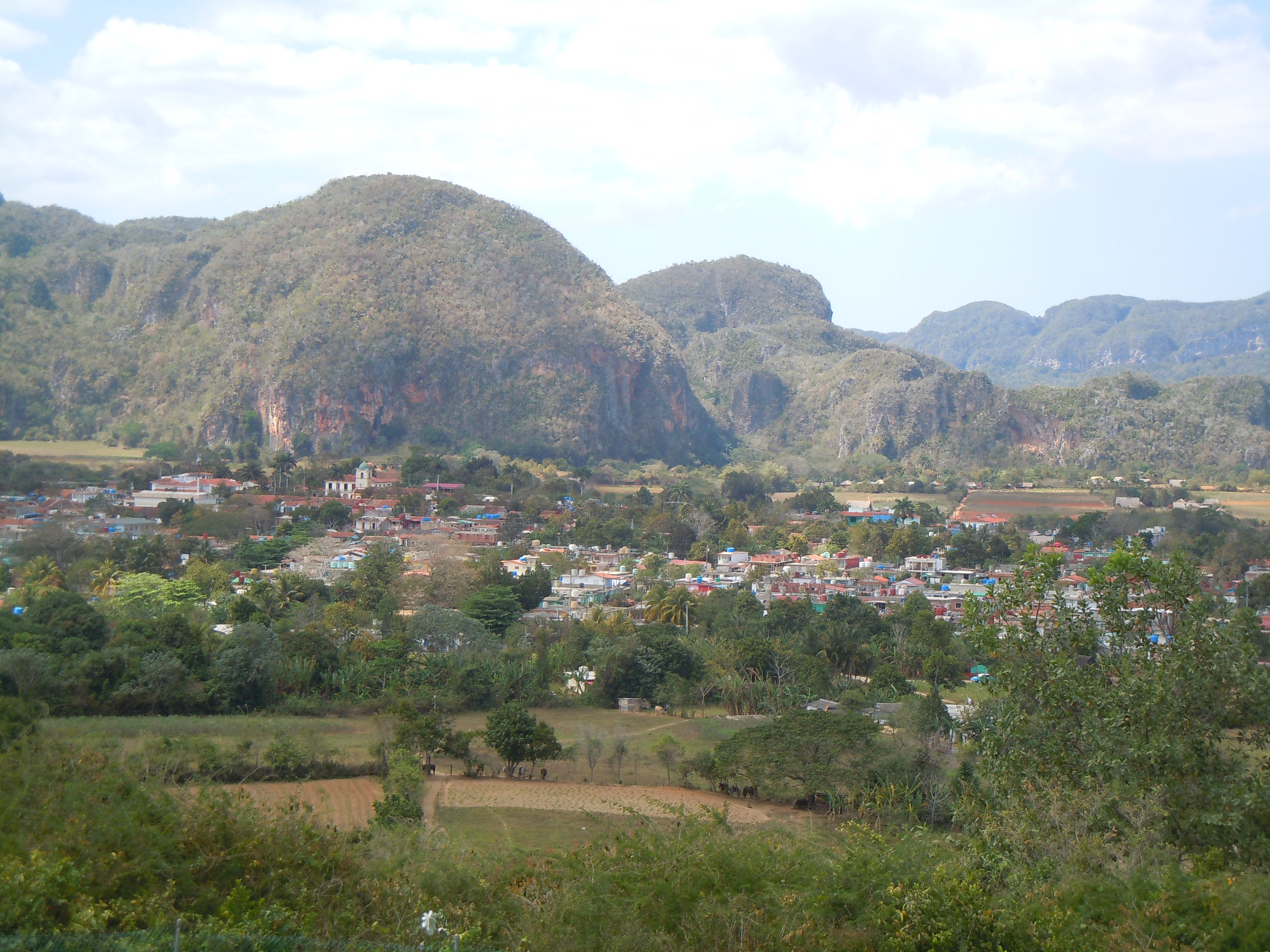 Viñales et Mogote del Valle depuis La Ermita